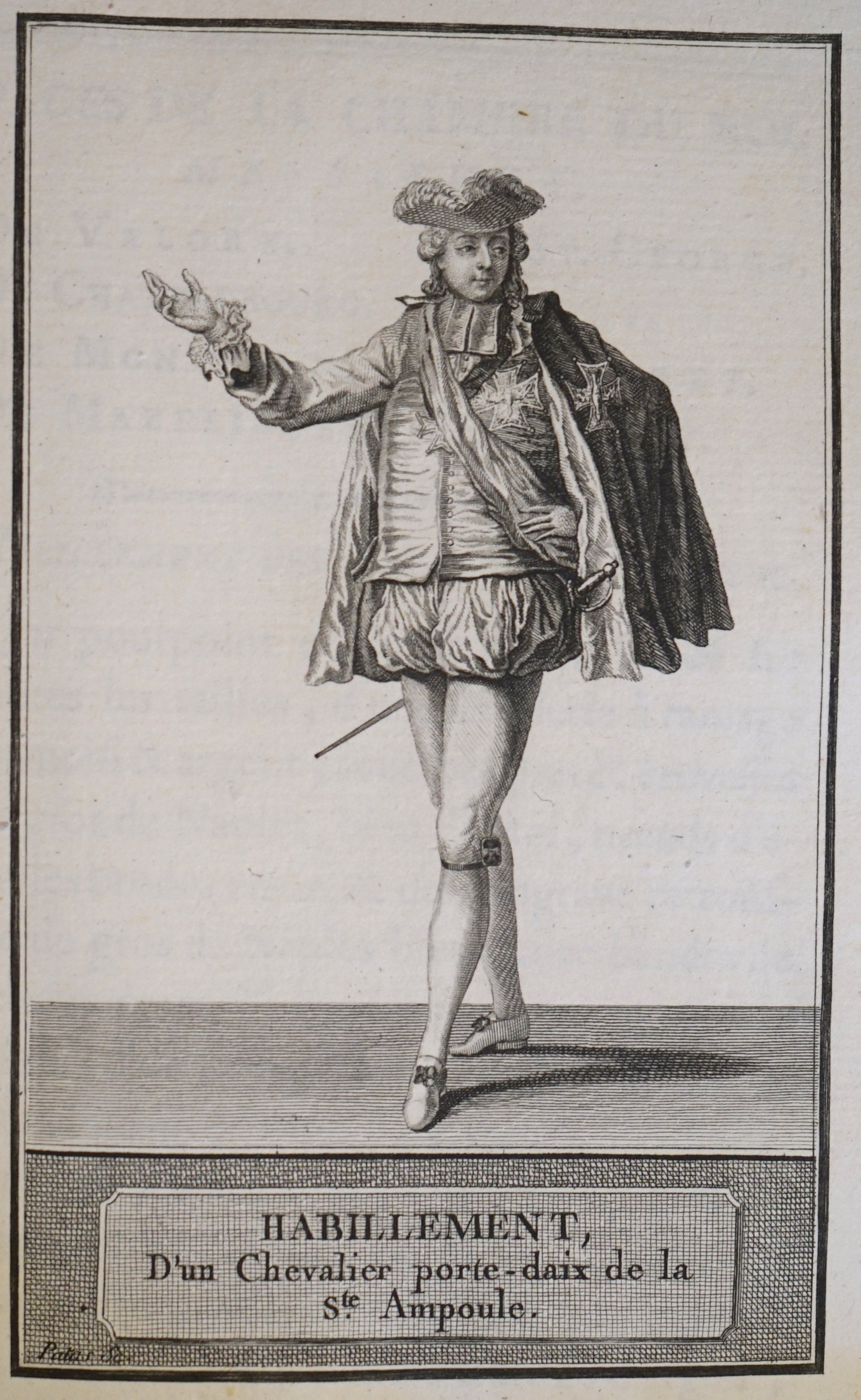 gravure de Patas pour le livre sur le couronnement de Louis XVI.